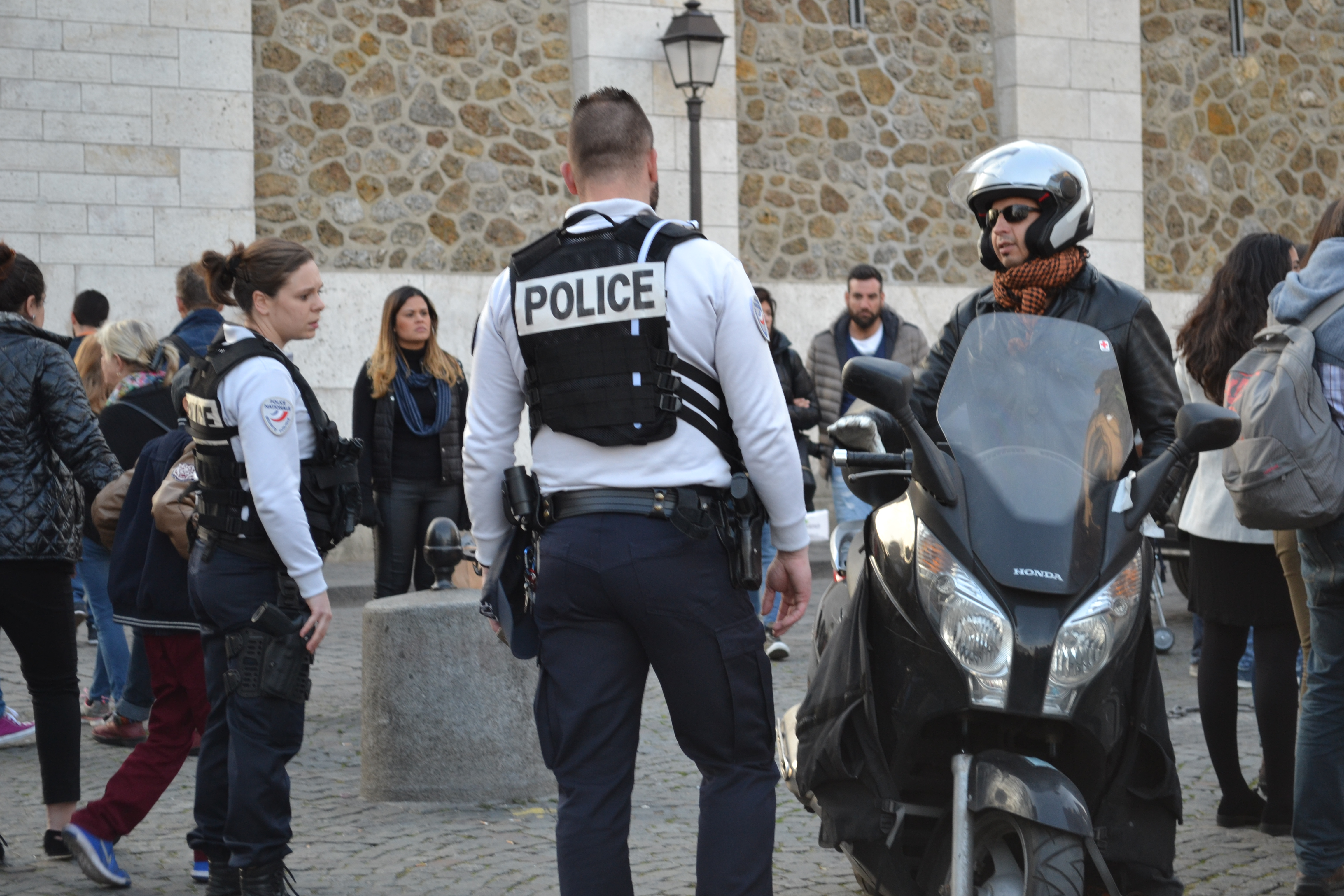 Paris, police française